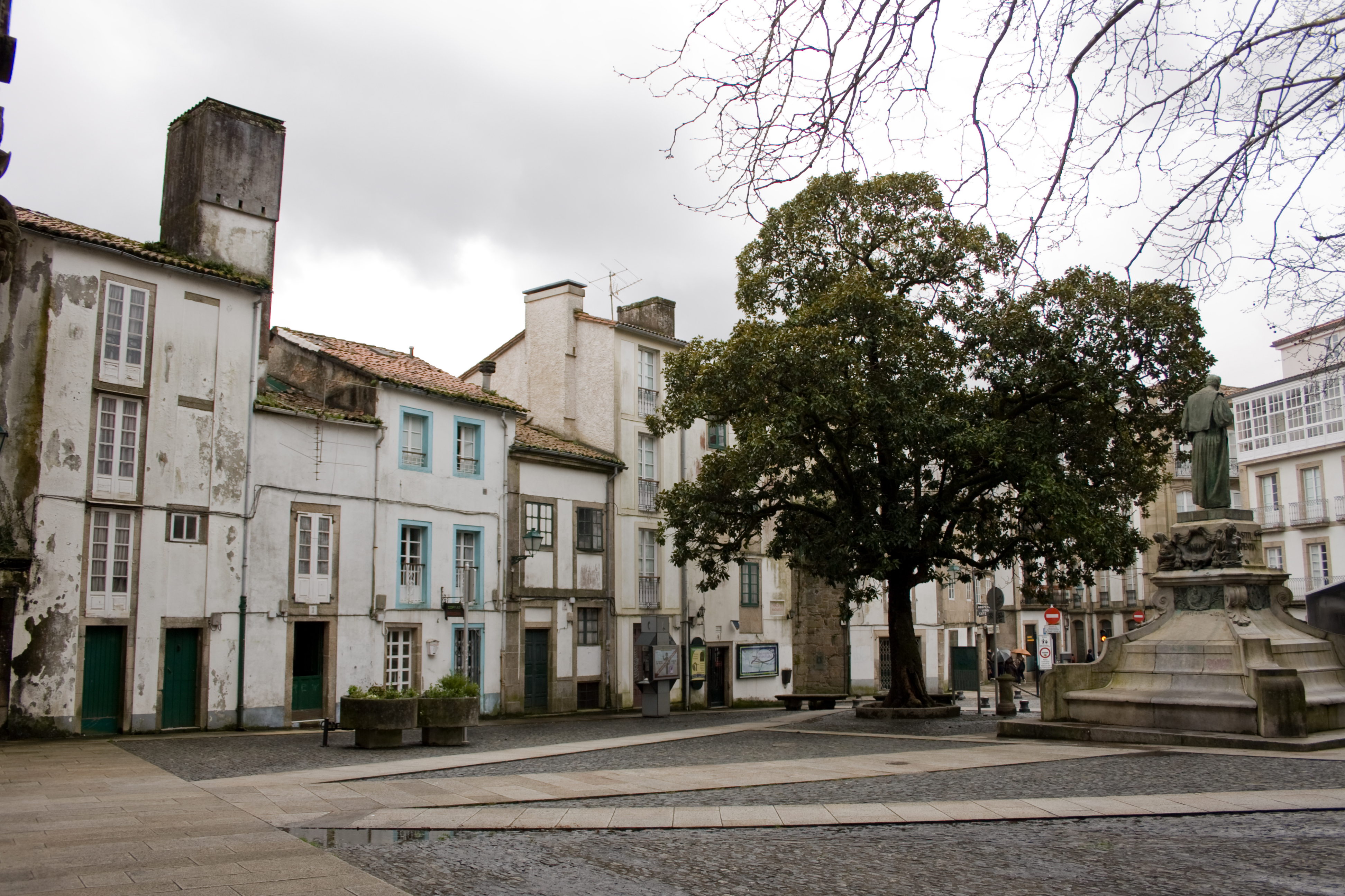 View of Mazarelos square, Santiago de Compostela.